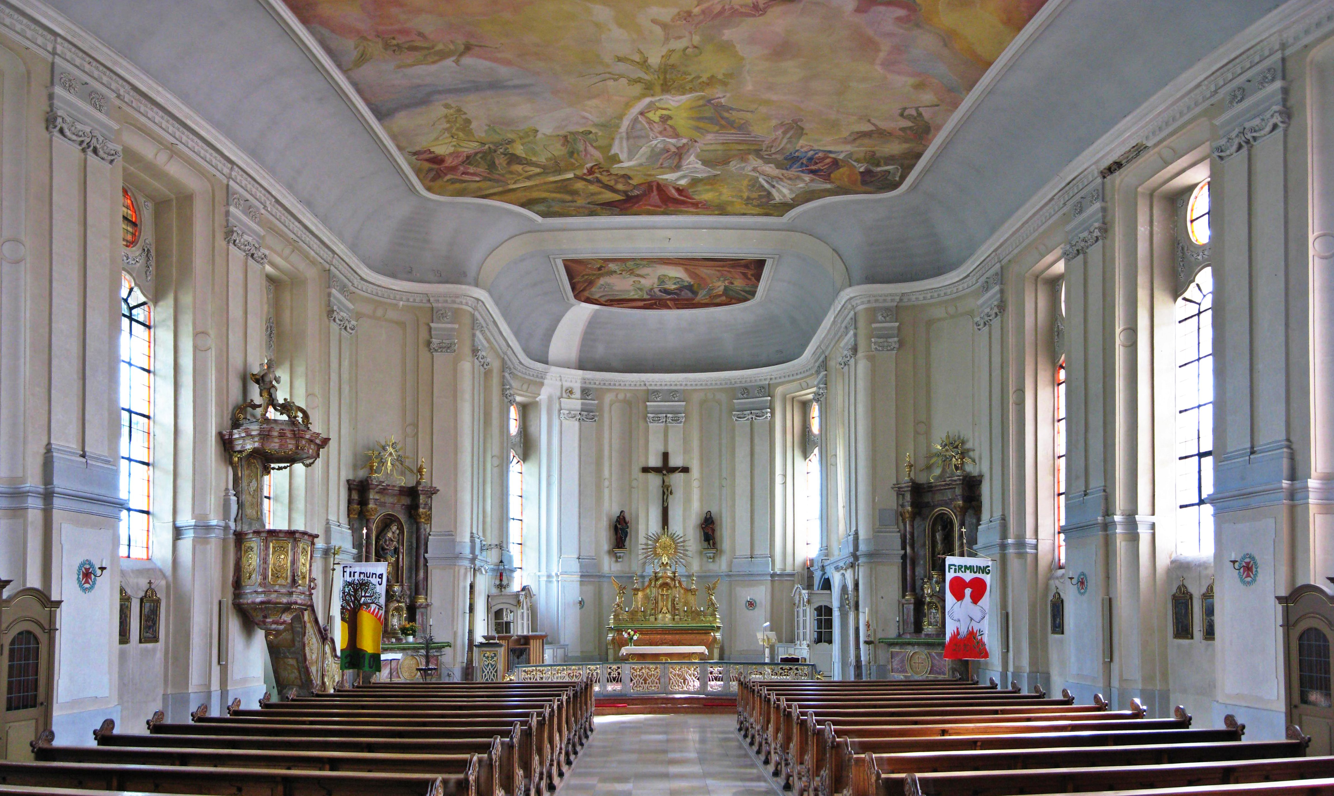 Decke der Schlosskirche (Blieskastel)